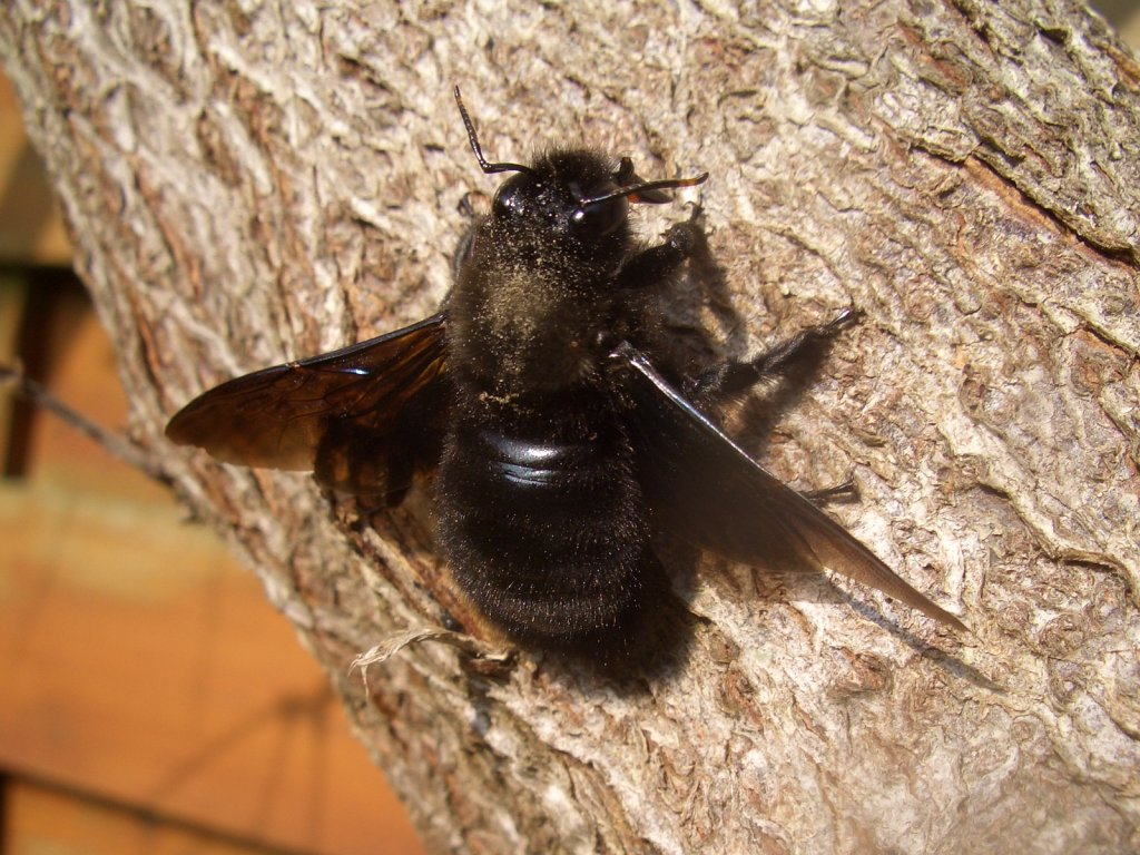 Abeille charpentière mâle Carpenter bee (Xylocopa violacea).